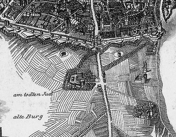 Ausschnitt aus einem Stich von Friedrich W. Delkeskamp (1794-1872) mit dem jüdischen Friedhof Judenbüchel.